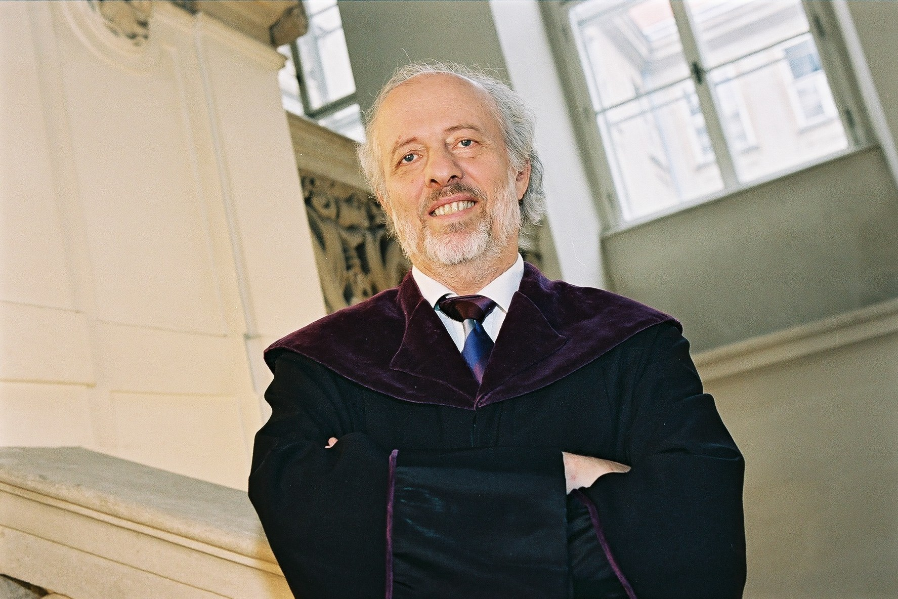 Dr. Kurt Heller ist ein österreichischer Jurist und ehemaliger Verfassungsrichter. Hier auf einem Bild aus dem Jahr 2003 als Verfassungsrichter im Talar.